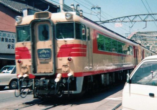 Nagoya Railroad DMU type Kiha-8000 At Inuyama-Yuen Sta. (Inuyama Bridge)